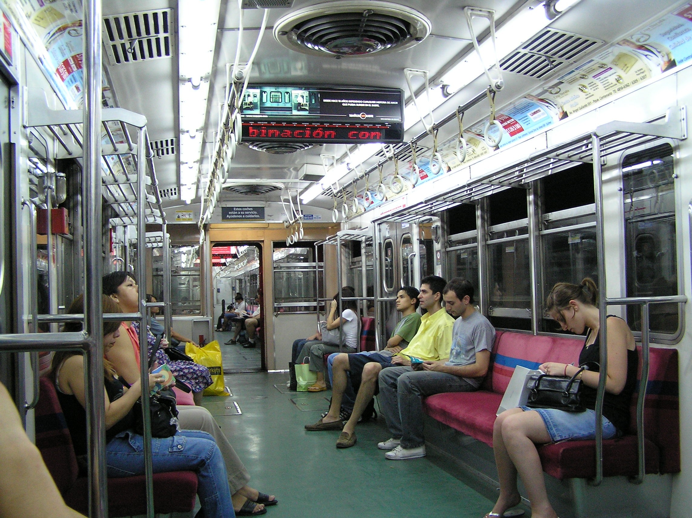 Vagon de la línea B del subte de Buenos Aires